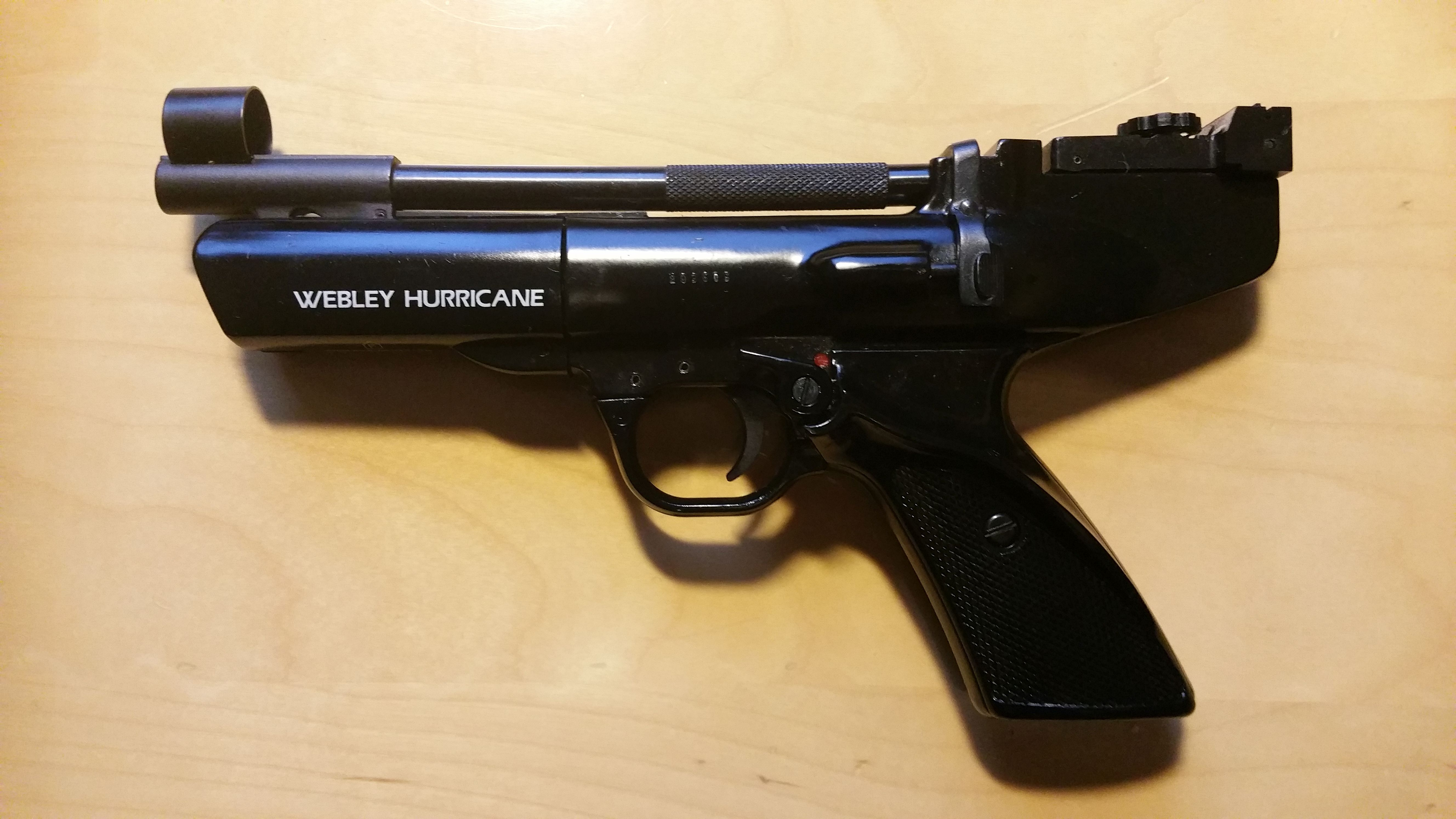 Webley Hurricane .22 air pistol